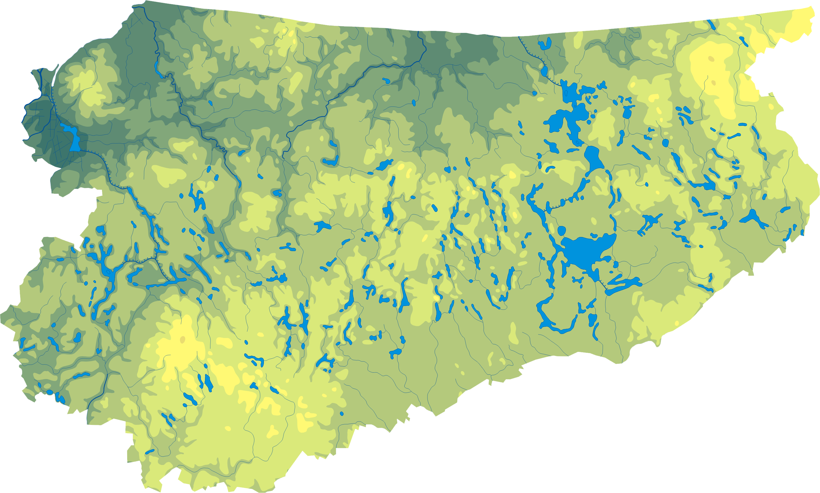 Mapa wód i ukształtowania powierzchni województwa warmińsko-mazurskiego. Autor: AotearoaWspółrzędne graniczne mapy: N: 54.4424° N S: 53.1407° N W: 19.1280° E E: 22.7856° E Legenda